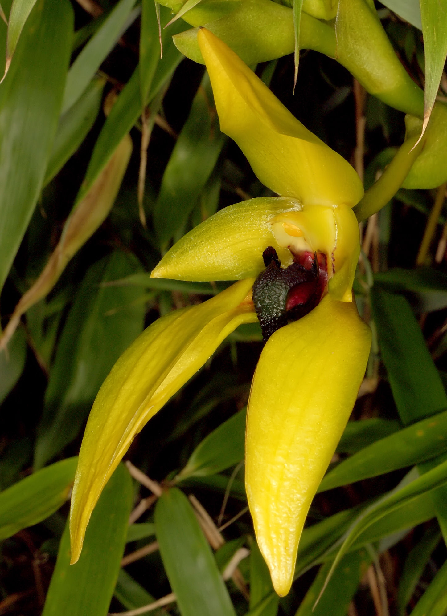 Bulbophyllum amplebracteatum subsp. carunculatum